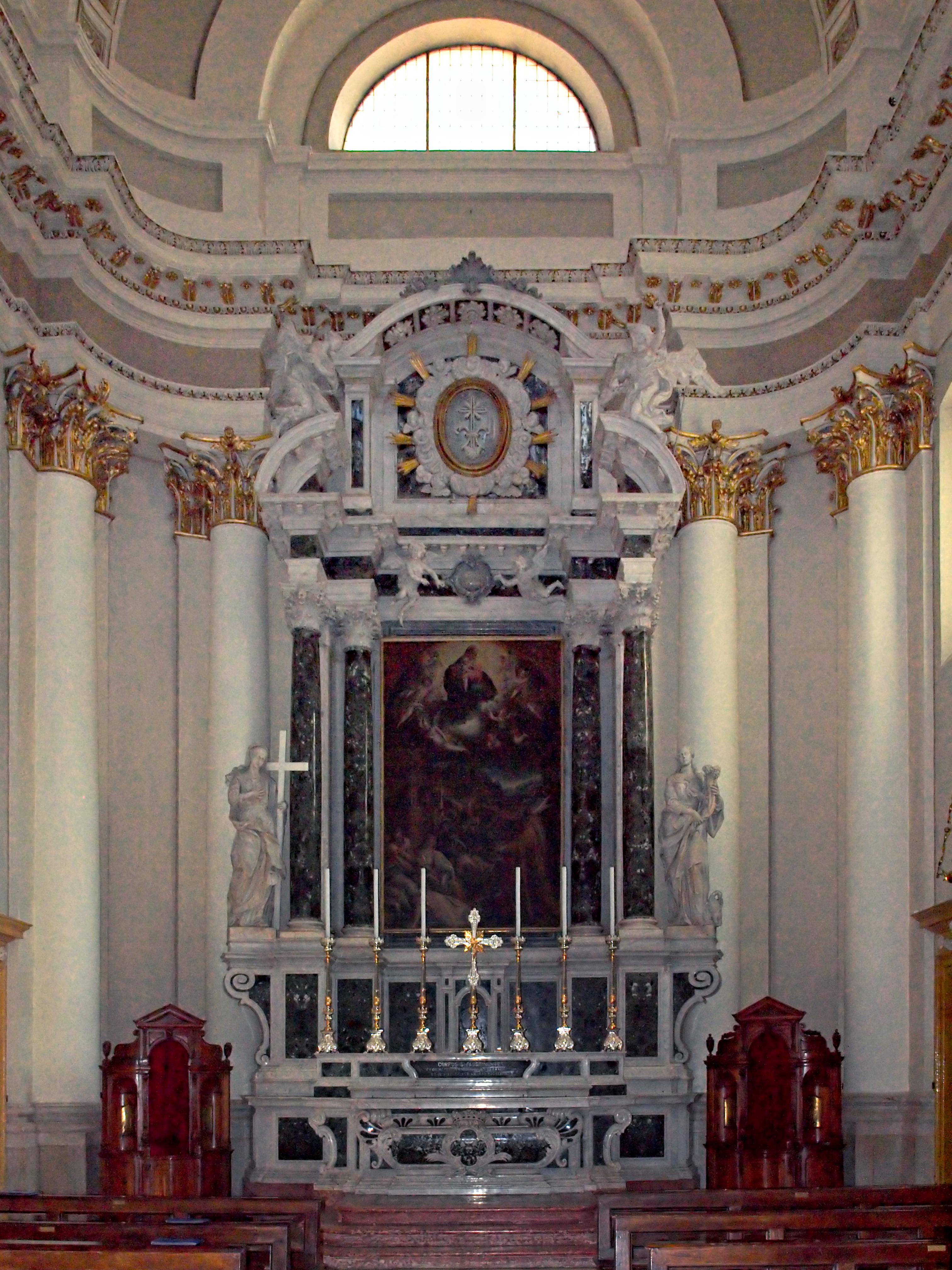 Lonato del Garda, Lombardie (Italie) - Chapelle latérale de la basilique San Giovanni Battista